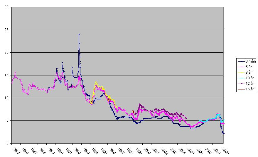 Diagram skapat av krokodilkalle från statistik om hypoteksräntor